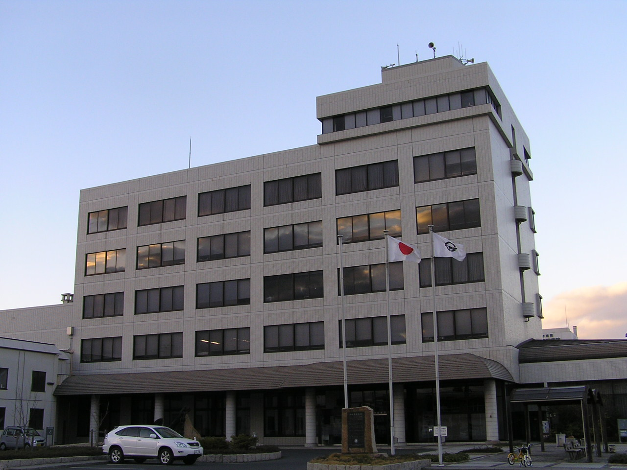 倉敷市水島支所